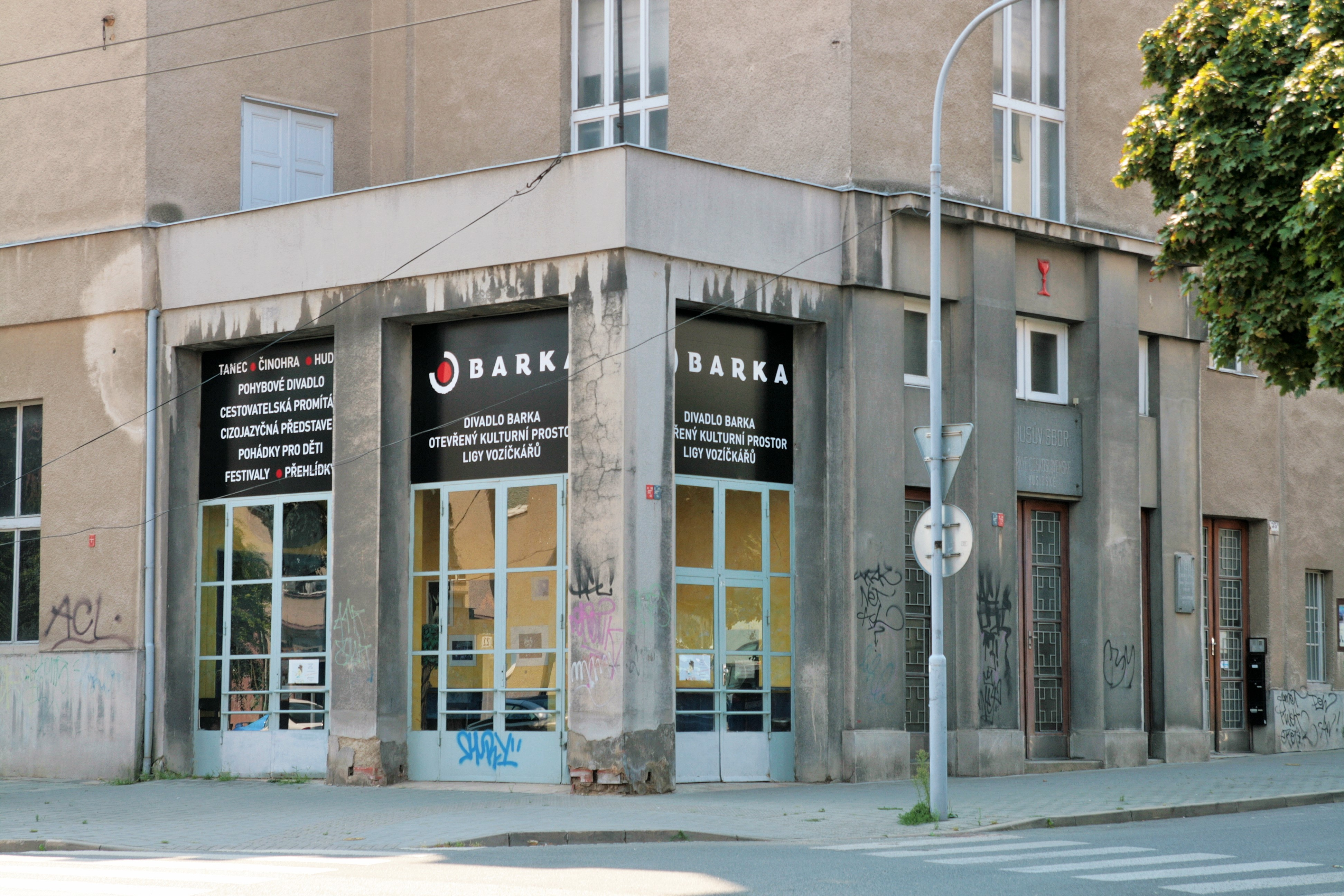 Divadlo Barka, otevřený kulturní prostor Ligy vozíčkářů, Svatopluka Čecha 1405/35a, Brno-Královo Pole. Pohled od východu na vstupní nároží.